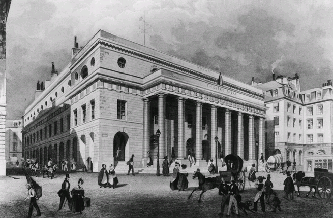 Théâtre de l'Odéon vers 1829